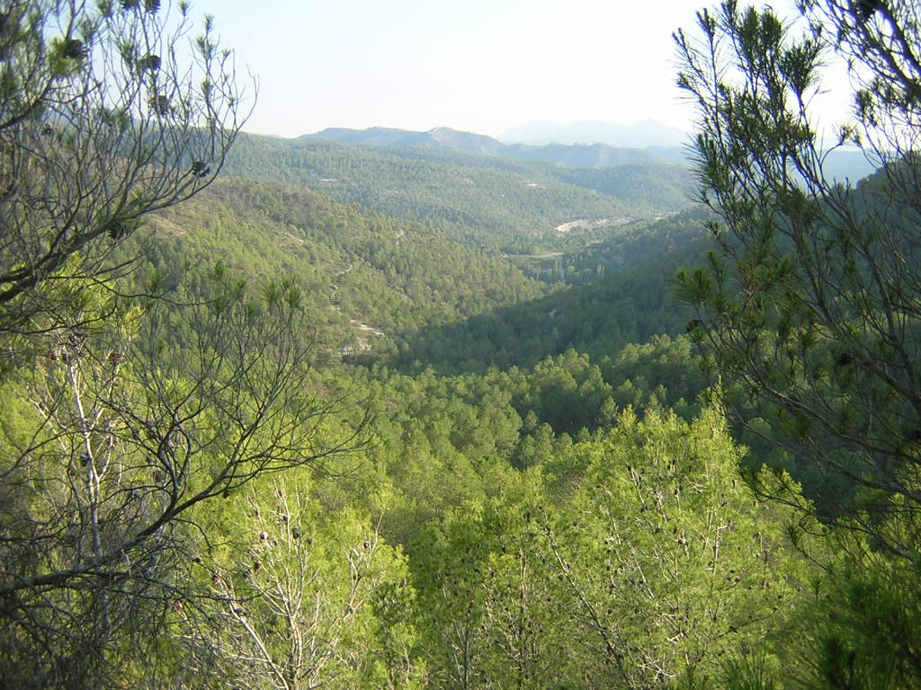 La vall de la Baga Cerdana (Monistrol de Calders, Moianès)